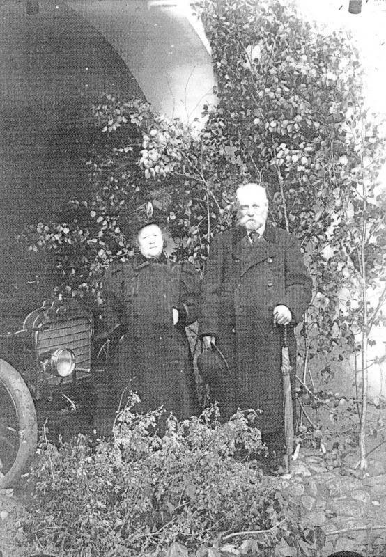 Иван Иванович Дурдин (1852-1918) с супругой Анной Васильевной Сытовой в Рыбинске (1915)